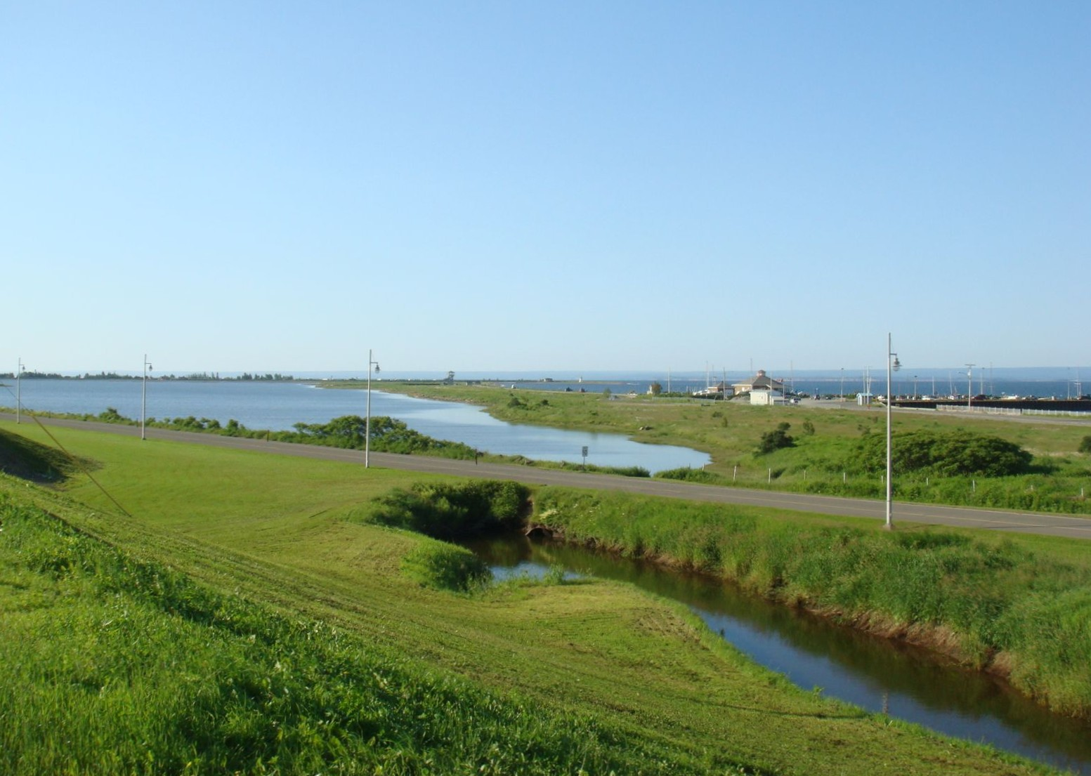 Barachois en bordure de la Baie-des-Chaleurs. Carleton-sur-mer (secteur Carleton), Gaspésie, Québec, Canada. On y voit le quai et la marina de Carleton, la tour d'observation de la colonie de sternes au centre et la bande de route du bas est celle qui mène à la halte routière et au parc d'amusement (merci à Morue69 !).